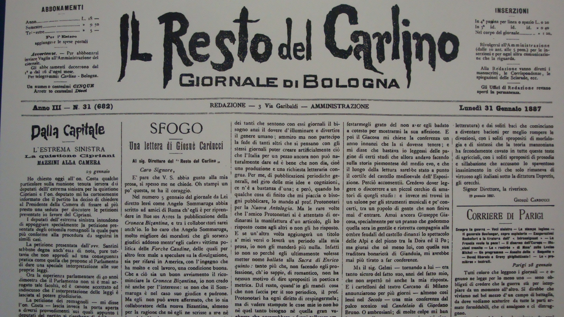 Prima pagina de il Resto del Carlino del 31 gennaio 1887 (Anno III).